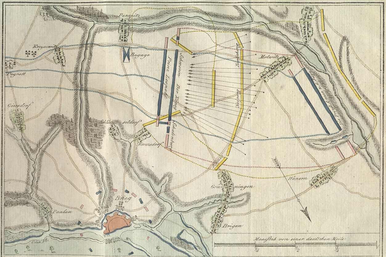 Militärkarte. Schlacht von Mollwitz. Brieg. Stellung der Preussische Armee und Österreichische Armeen.